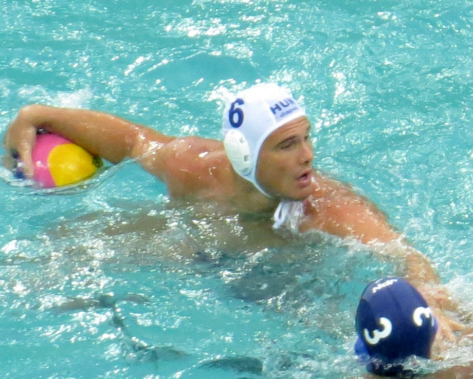 Rio 2016. Polo aquatico. sx50 16